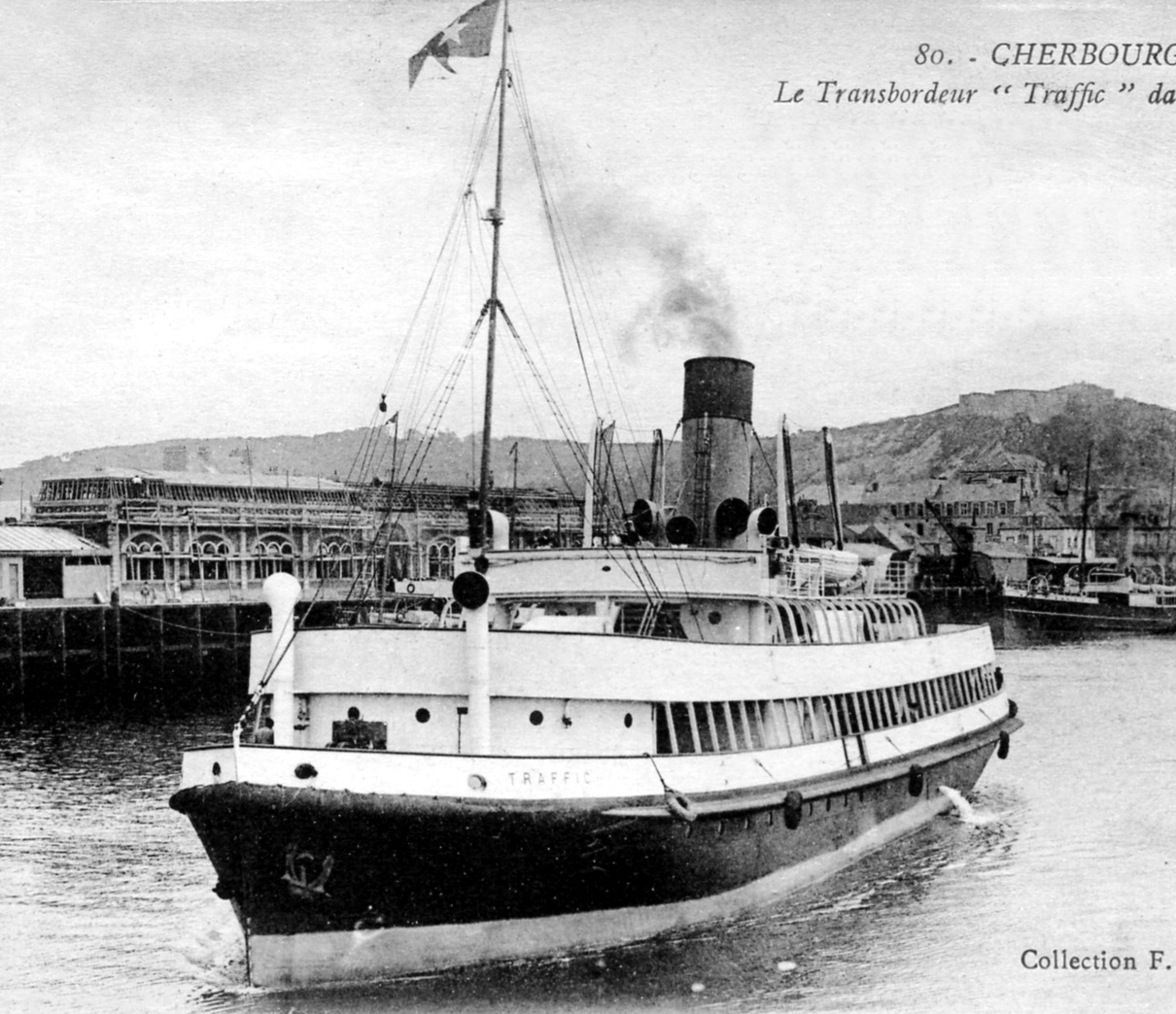 El transbordador SS Traffic en Cherburgo (foto recortada).